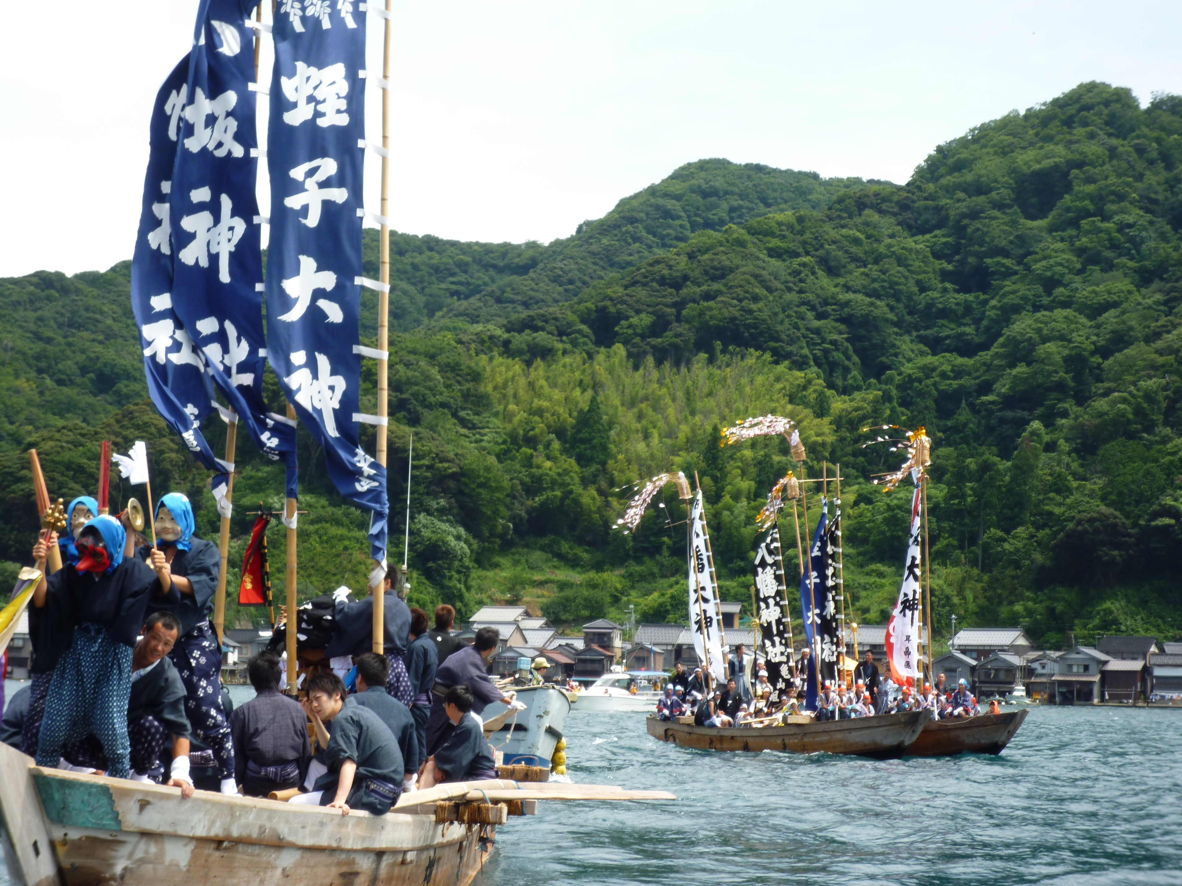 伊根祭。海上渡御。手前が神楽丸、後方が祭礼船。